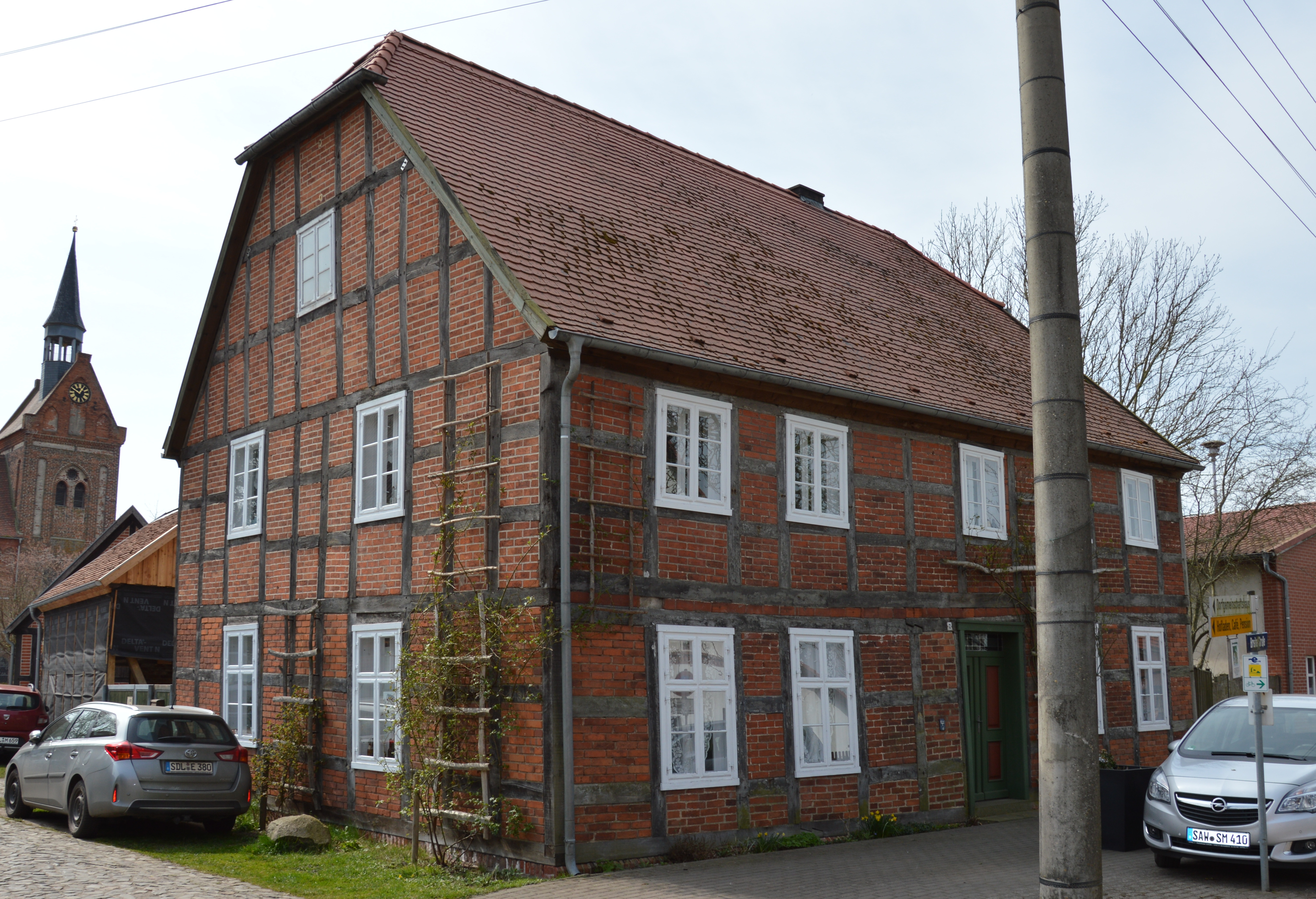 Haus Breite Straße 7 in Beuster